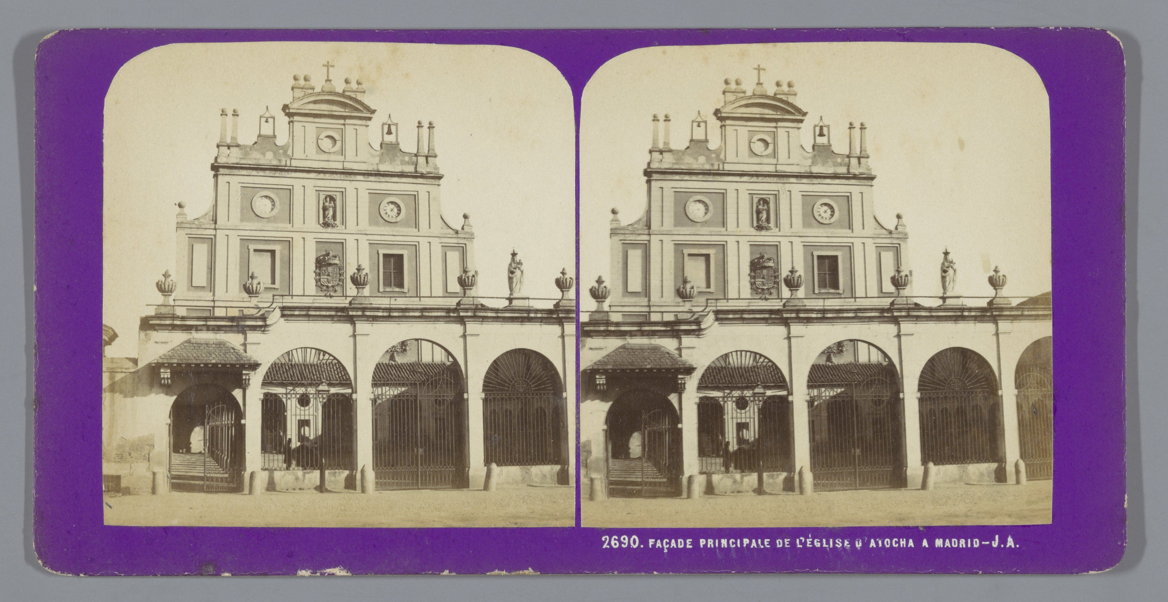 IdentificatieTitel(s): Gevel van de Real Basílica de Nuestra Señora de Atocha te MadridFAÇADE PRINCIPALE DE L'ÉGLISE A ATOCHA A MADRID (titel op object)Objecttype: stereofoto Objectnummer: RP-F-F07661Opschriften / Merken: nummer, recto, gedrukt: ‘2690.’VervaardigingVervaardiger: fotograaf: Jean Andrieu (vermeld op object)Plaats vervaardiging: MadridDatering: 1862 - 1876Fysieke kenmerken: albuminedrukMateriaal: karton fotopapier Techniek: albuminedrukAfmetingen: secundaire drager: h 85 mm × b 170 mmOnderwerpWat: façade (of house or building)church (exterior)Waar: Real Basílica de Nuestra Señora de AtochaVerwerving en rechtenVerwerving: overdracht van beheer 1994Copyright: Publiek domein